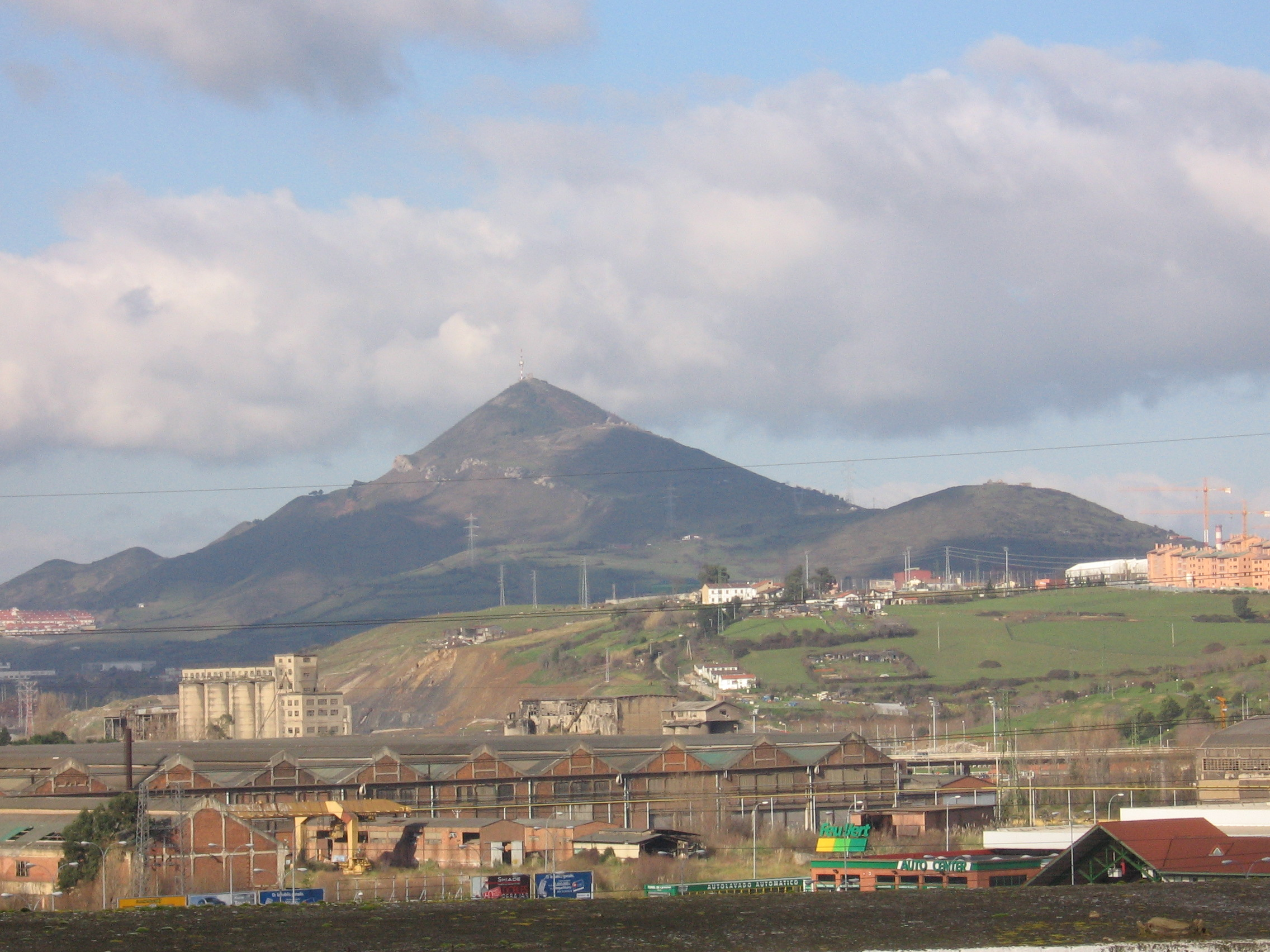 Sestao und Berg Serantes (Santurtzi) an der Ría de Bilbao, Ansicht von Barakaldo aus, Baskenland, Spanien